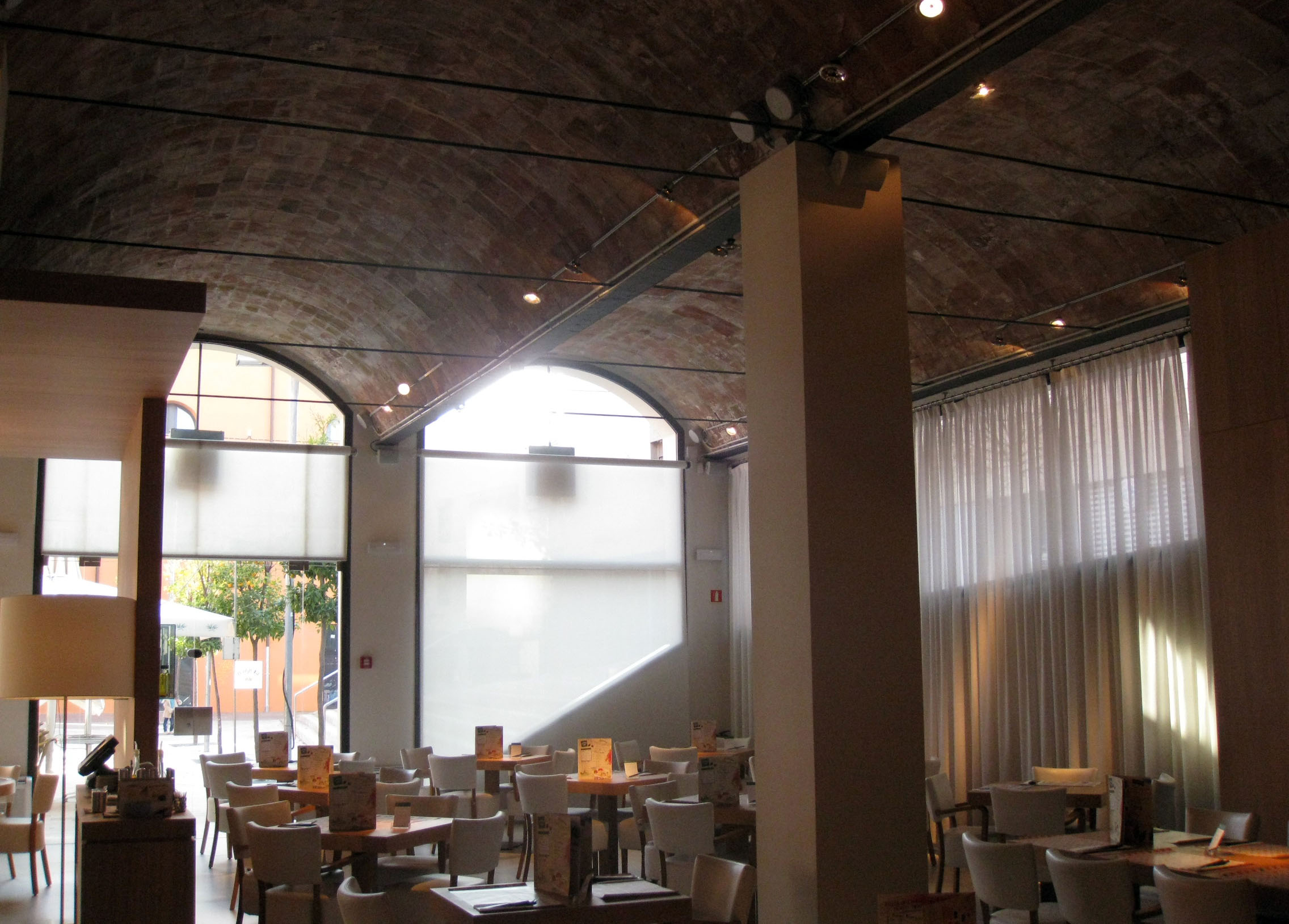 Nau de l'antic Vapor Gran (Terrassa)